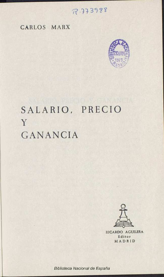 Salario, precio y ganancia ; Carlos Marx Autor: Marx, Karl (1818-1883) Fecha: 1968 Datos de edición: Madrid, Ricardo Aguilera